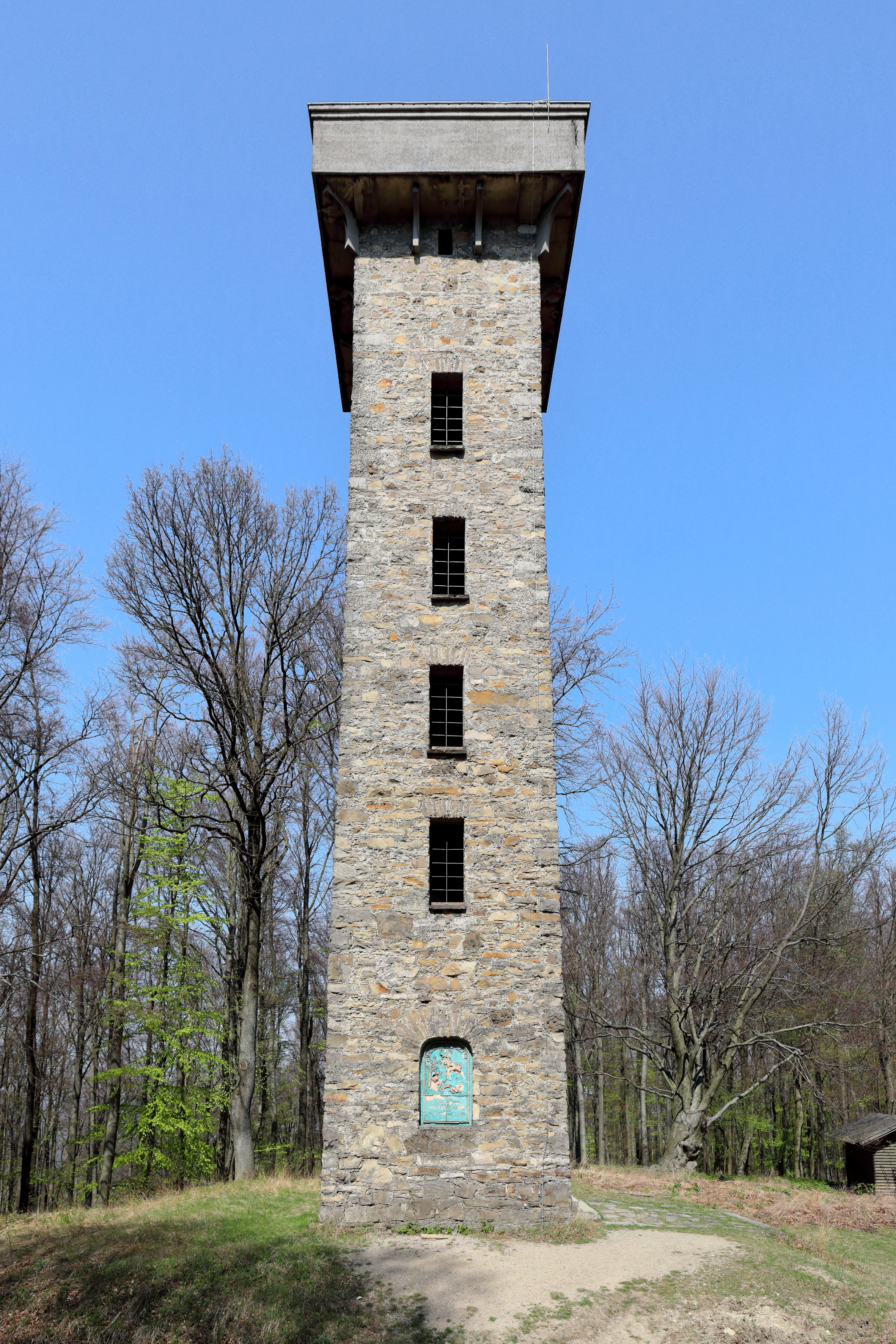 Die Südansicht der Hubertuswarte auf dem Kaltbründlberg im Lainzer Tiergarten im 13. Wiener Bezirk Hietzing.